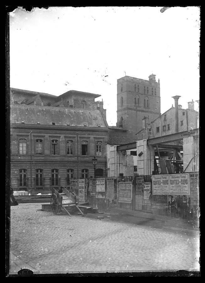 Immeuble, 1bis rue Joseph-de-Malaret et 41 rue de Metz. Vers 1890. Vue d'une partie de l'immeuble en construction. Au premier plan route pavée, palissade, Charette, chantier ; au second plan immeubles donnant sur la rue Riguepels ; au fond clocher de la cathédrale Saint-Etienne.